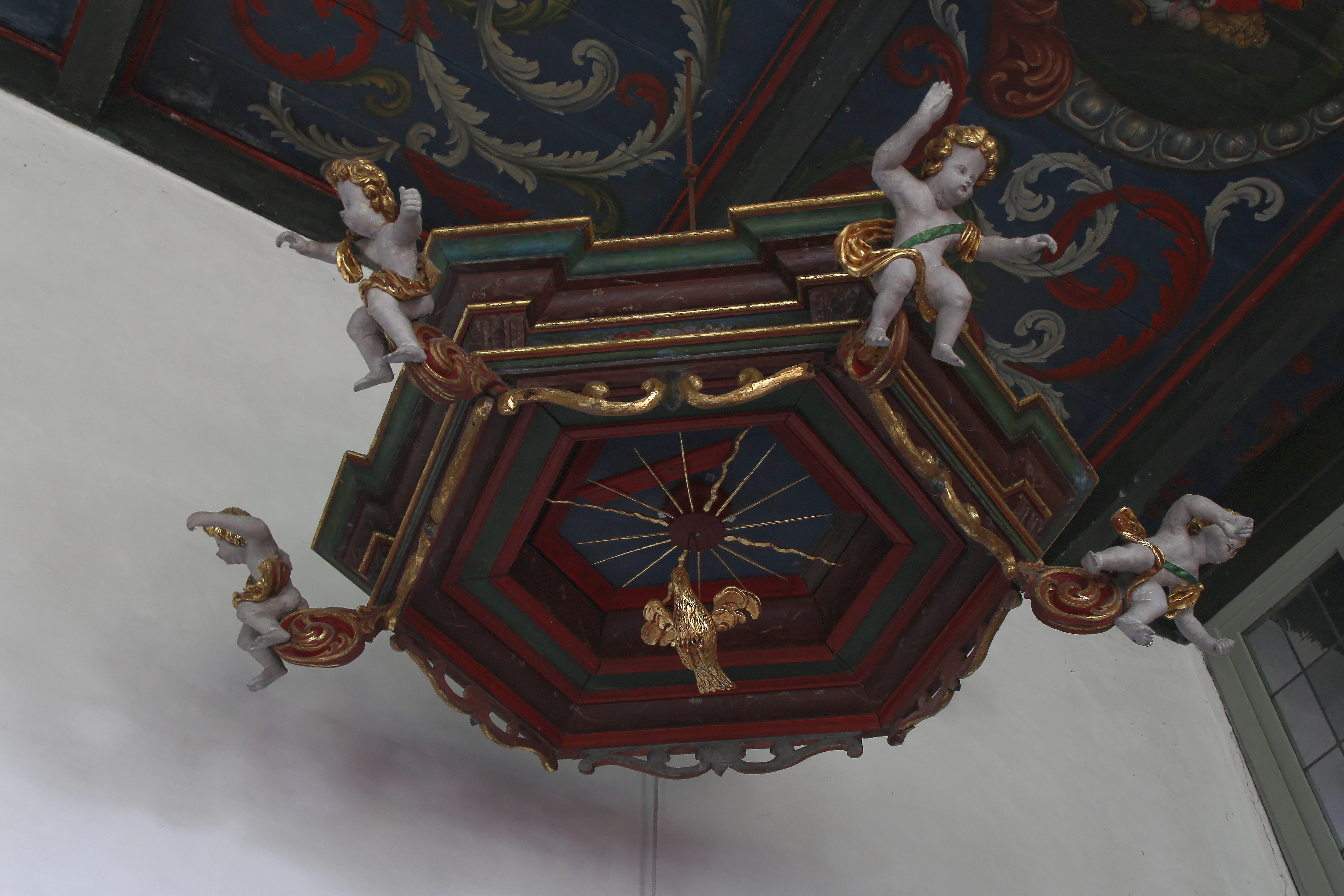 Hallig Langeneß, Kirche, Schalldeckel der Kanzel